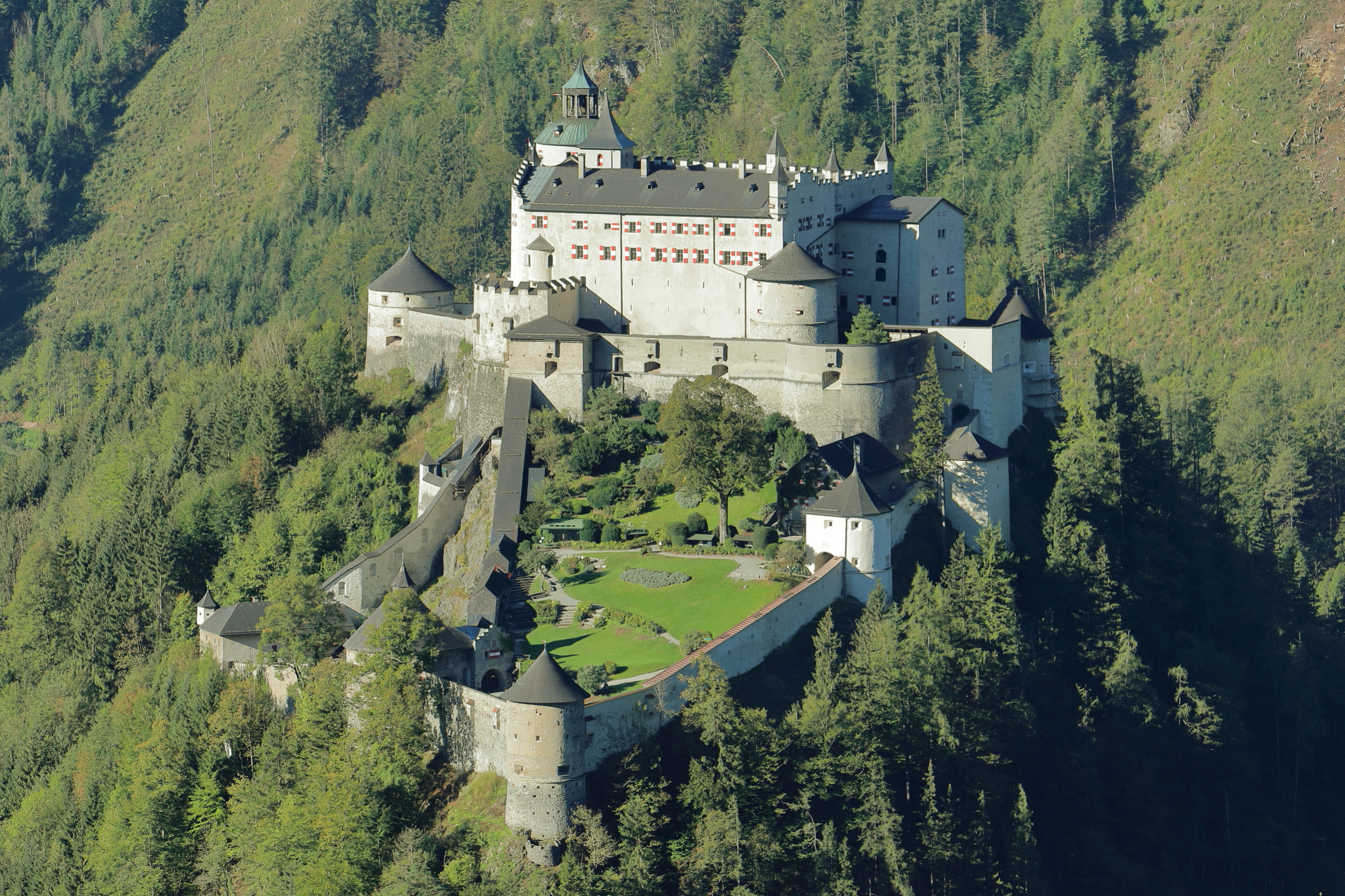 Ostnordostansicht der Burg Hohenwerfen, auch als Festung Hohenwerfen bezeichnet, in der Salzburger Marktgemeinde Werfen.Die ab dem 11. Jahrhundert errichtete Burg war ein strategisches Bollwerk zwischen dem Tennen- und Hagengebirge auf einem 155 Meter hohen markanten Felskegel im Salzachtal.